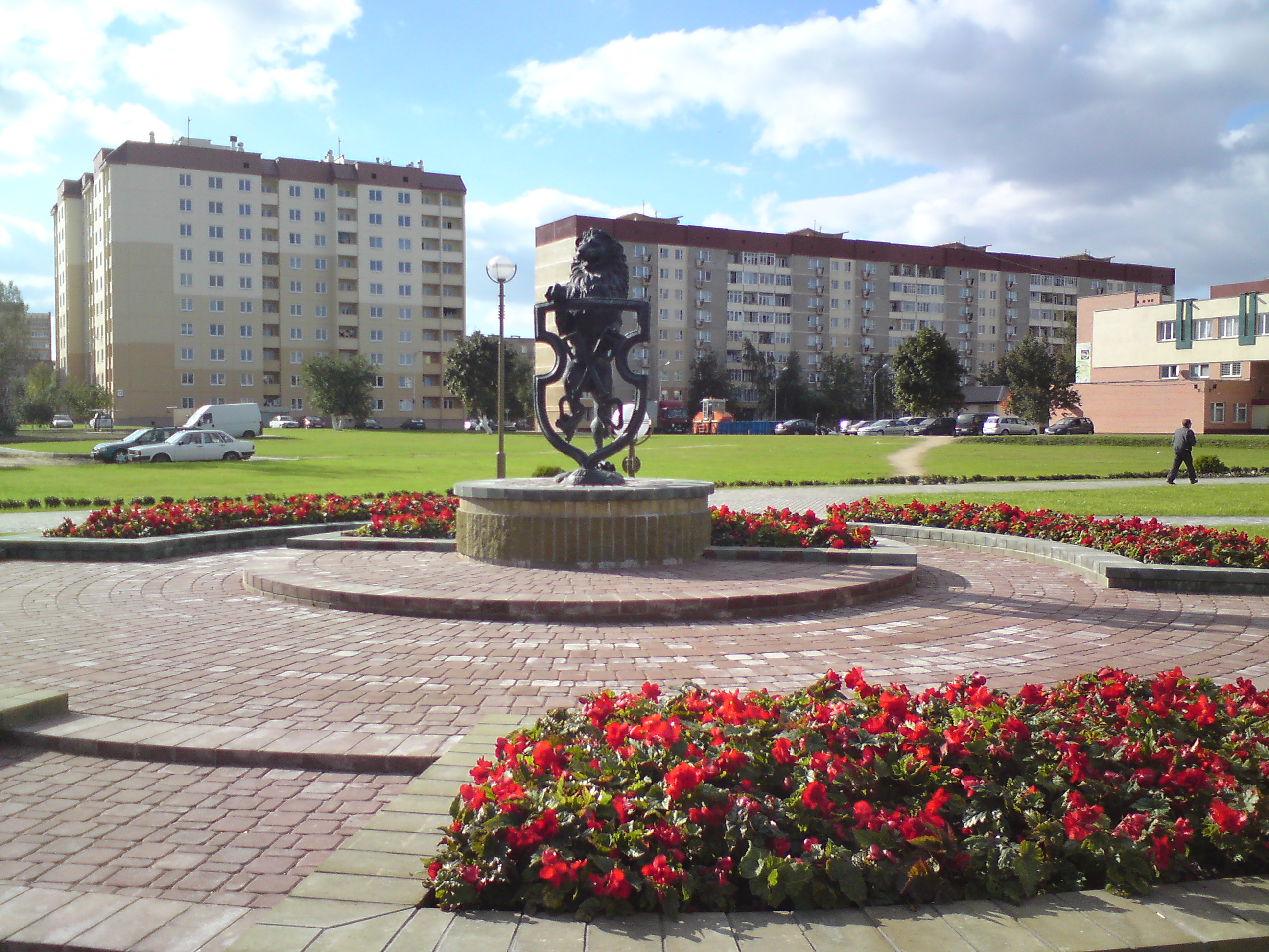 Статуя льва в центре города